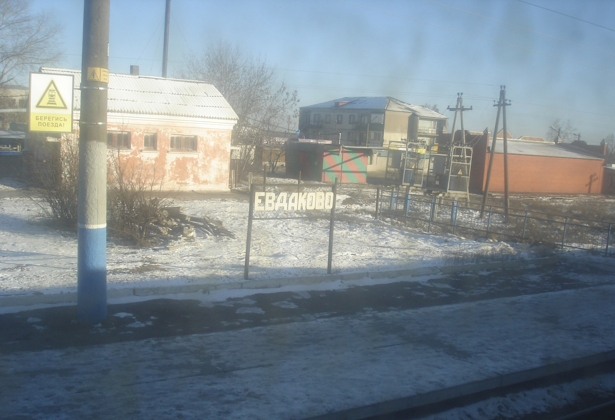 Здания на ЖД-станции Евдаково